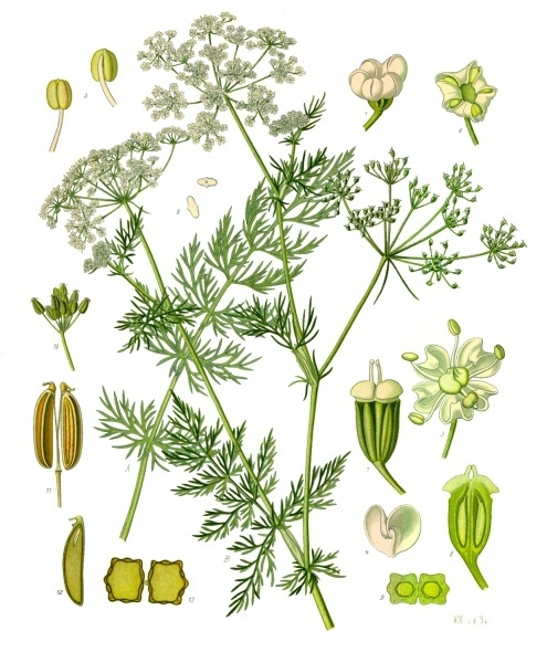 Kümmel. A unteres Blatt, natürl. Grösse; B oberer Theil der Pflanze, desgl.; 1 u. 2 noch nicht entfaltete Blüthe von verschiedenen Seiten, vergrössert; 3 Blüthe, vollständig entwickelt, desgl.; 4 Kronblatt, desgl.; 5 Staubgefässe, desgl.; 6 Pollen, desgl.; 7 Stempel, desgl.; 8 derselbe im Längsschnitt, desgl.; 9 Fruchtknoten im Querschnitt, desgl.; 10 Fruchtdöldchen, etwas vergrössert; 11 reife Frucht, vergrössert; 12 Theilfrüchtchen im Längsschnitt, desgl.; 13 Frucht im Querschnitt, desgl.